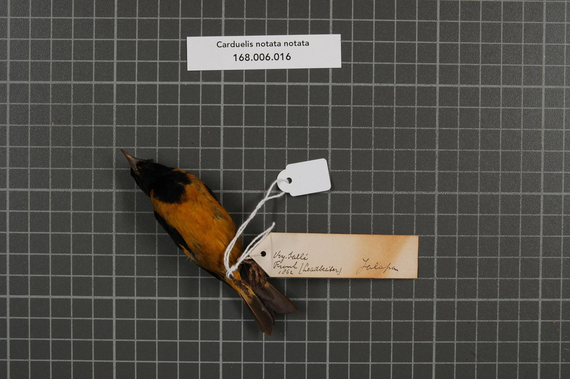 Carduelis notata notata Du Bus, 1847